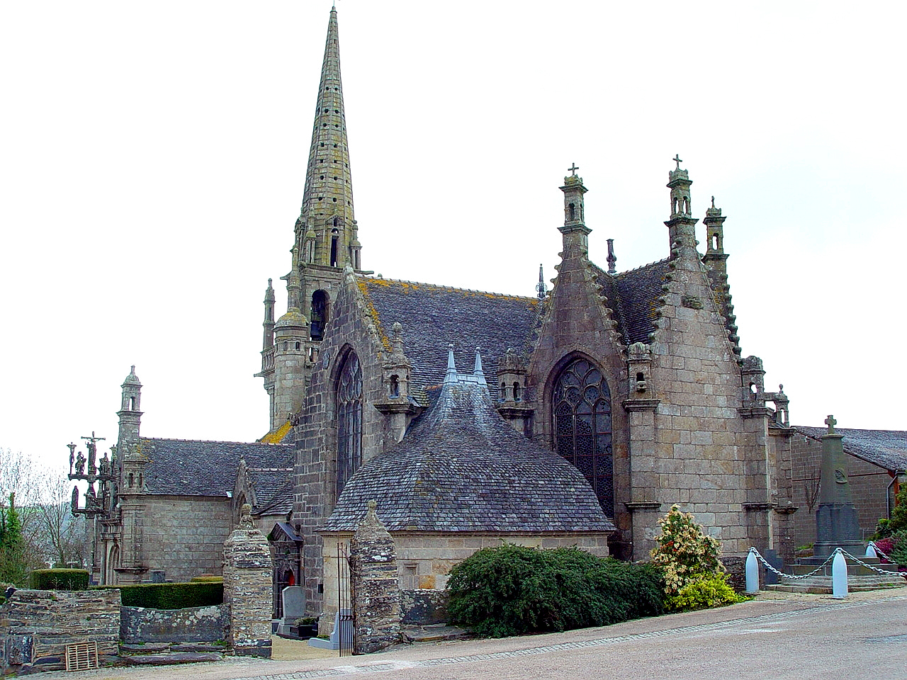 Locmélar (Bretagne, Finistère) Kirche Saint-Mélar, Friedhof und Calvaire.